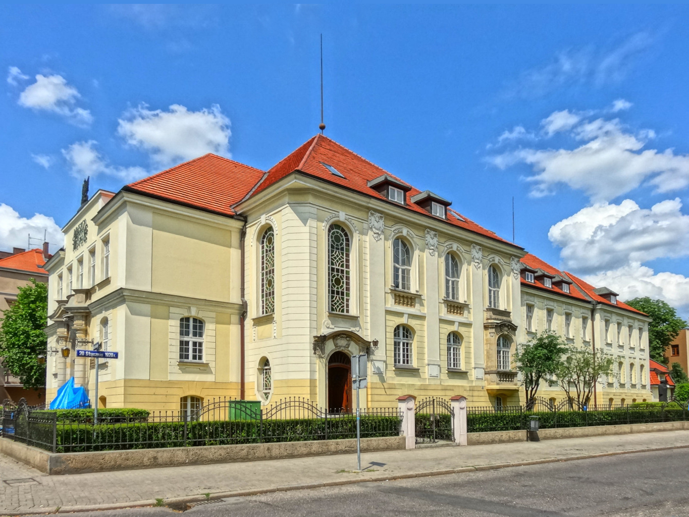 Zespół Urzędu Powiatowego, zbud. 1904-1906, ob. budynek główny Akademii Muzycznej w Bydgoszczy przy ul. Słowackiego